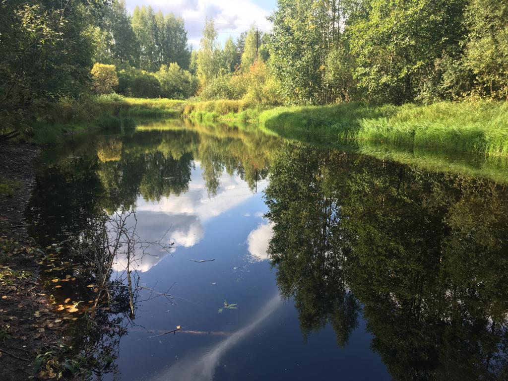 Речка Уломка в деревне Коротово